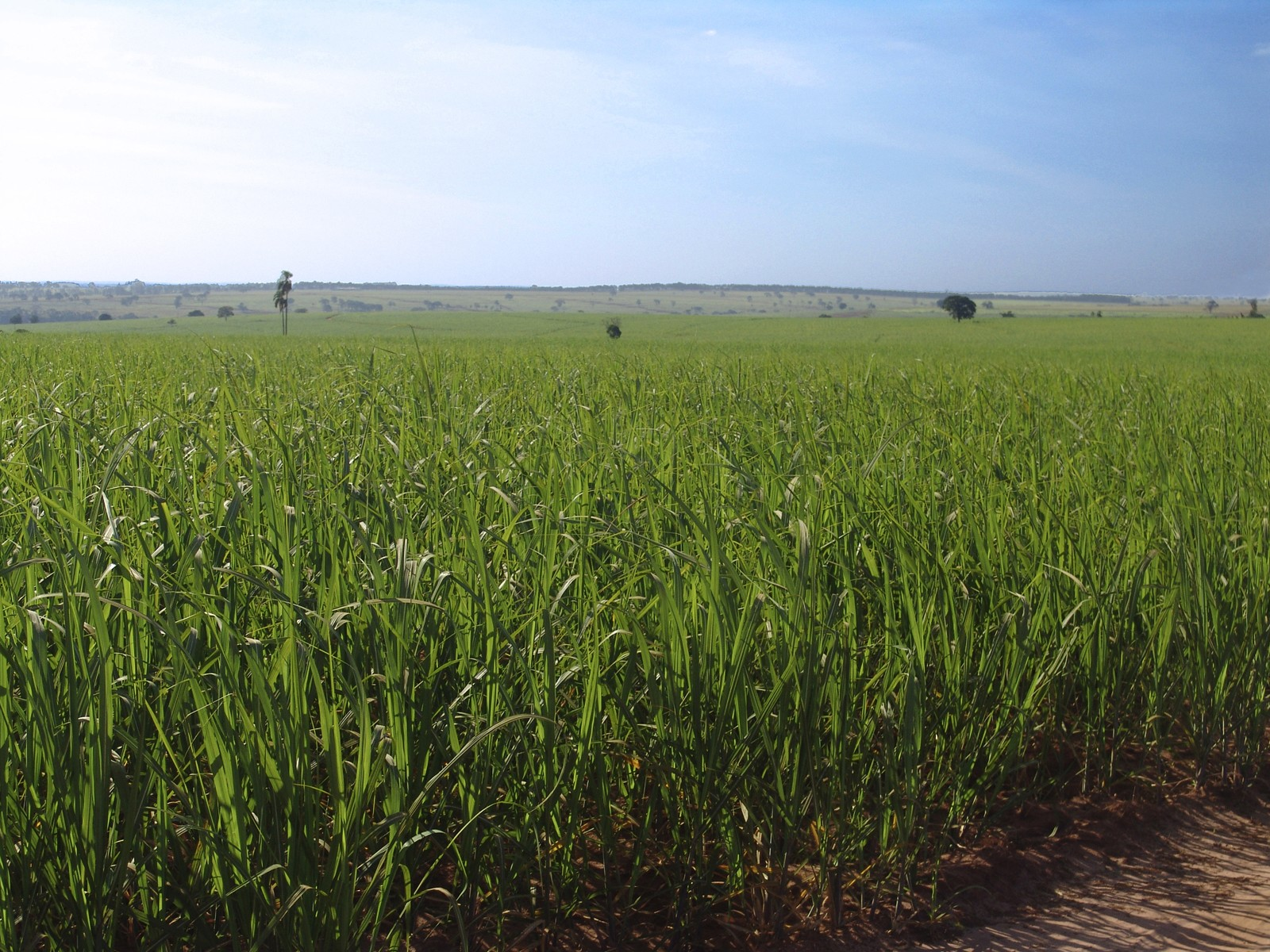 Cultura cana-de-açucar, pés jovens, Avaré, São Paulo